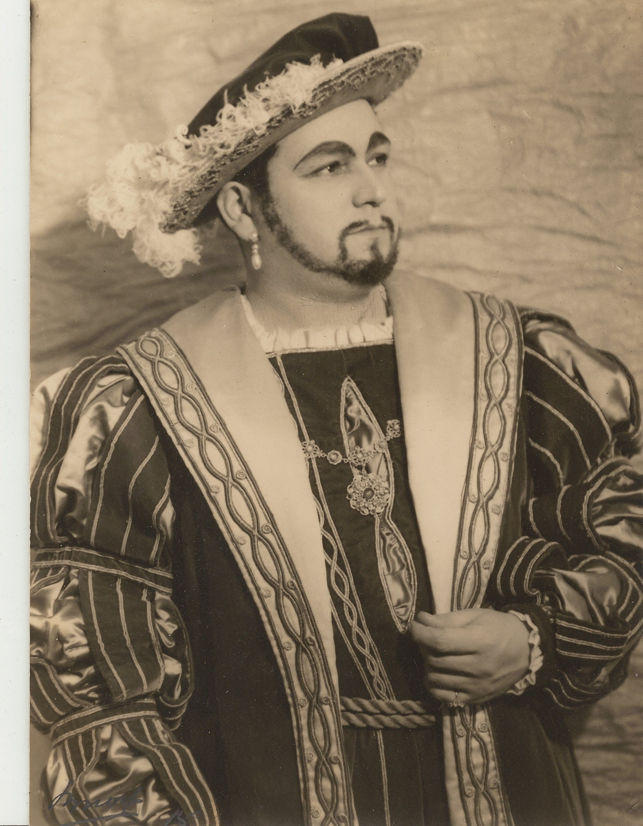 Le duc de Mantoue